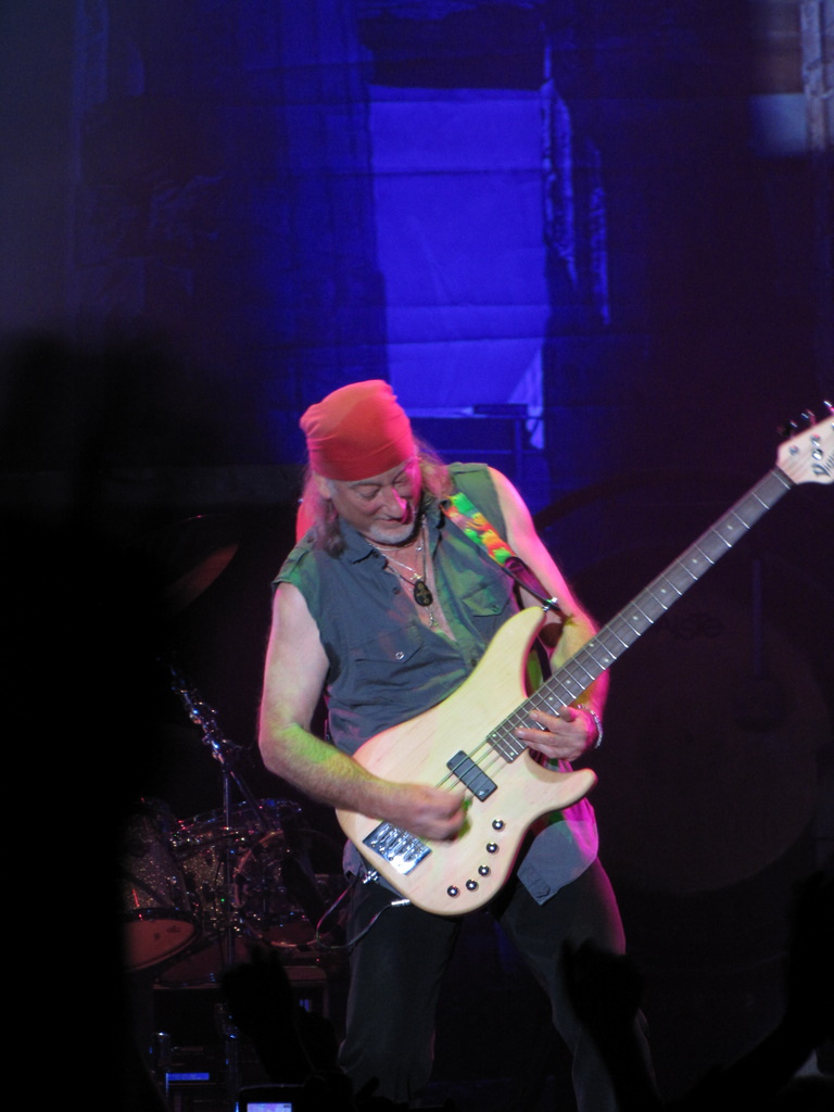 Roger Glover (Deep Purple) in Wrocław 2010